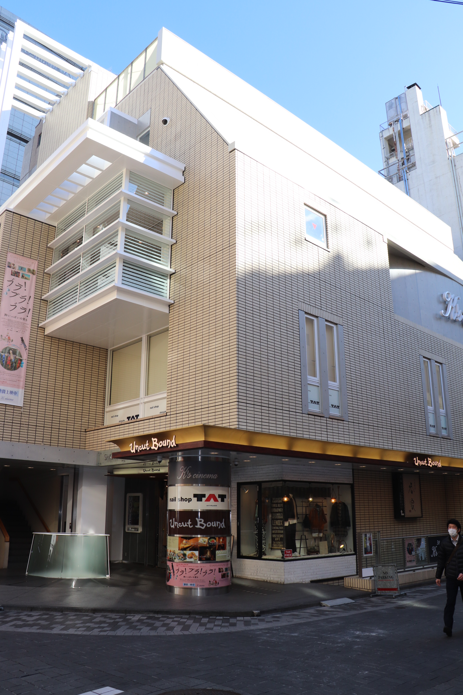 新宿・K's cinema